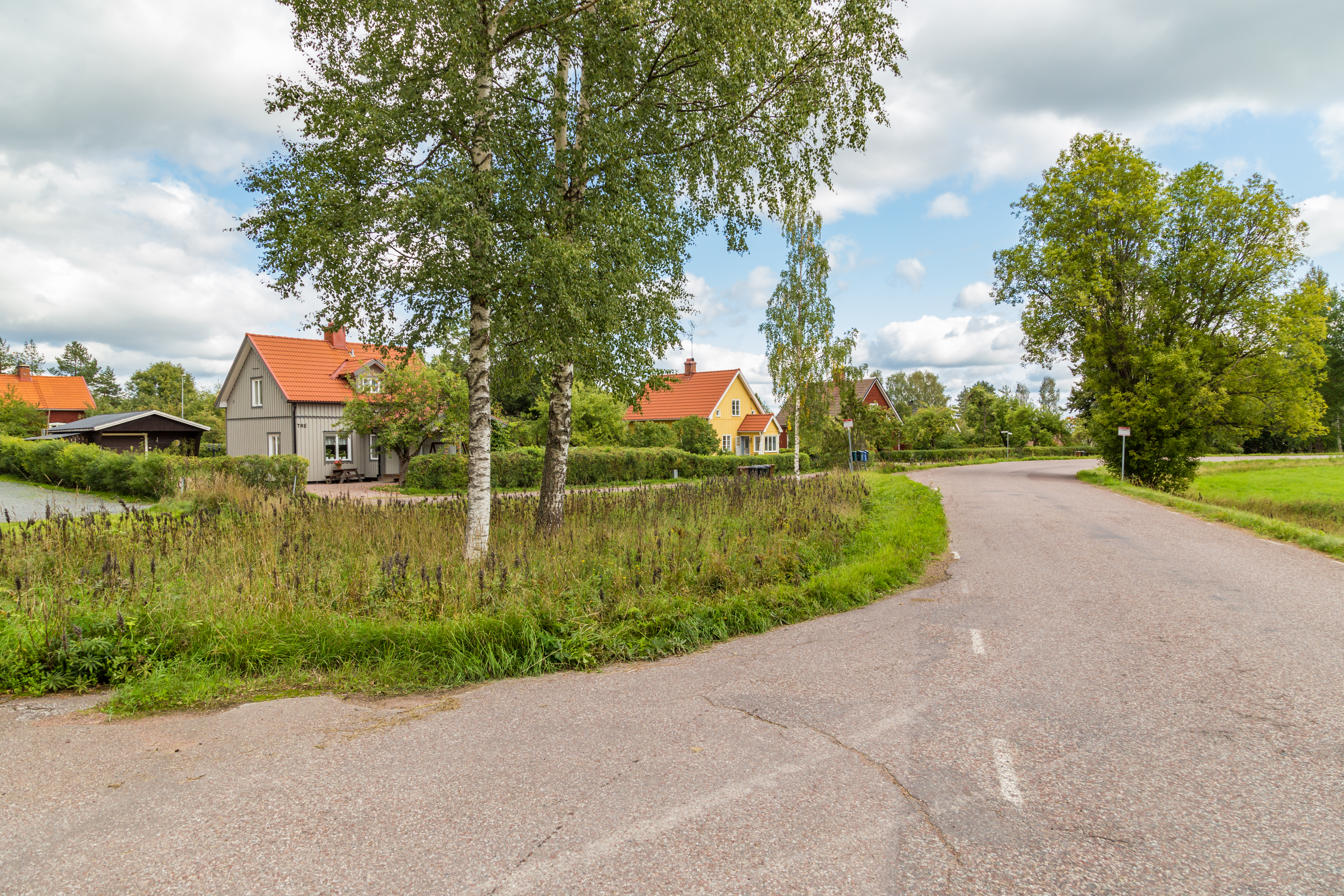 Lerbo, Hedemora kommun, Dalarnas län, Sverige